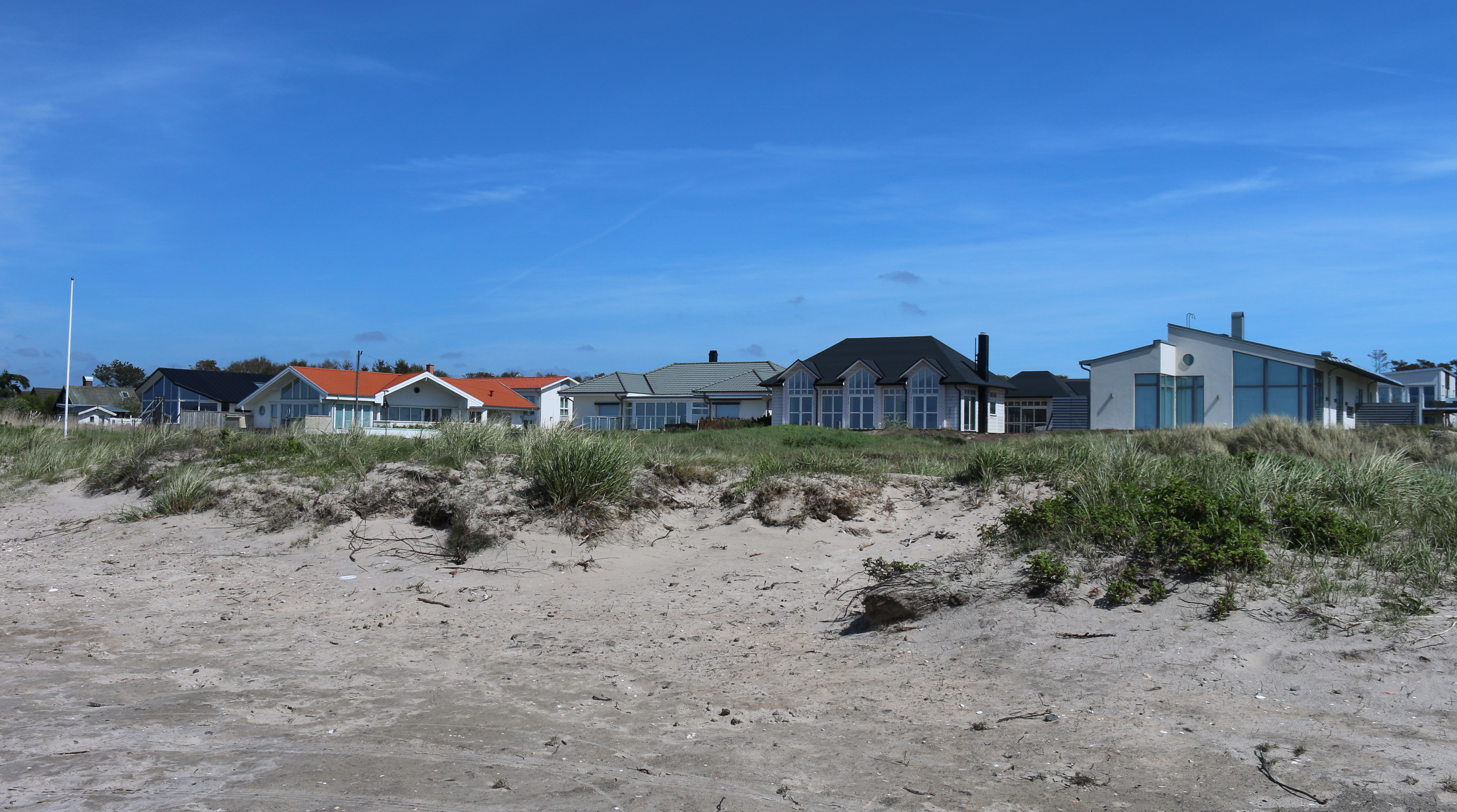 Skummelövsstrand